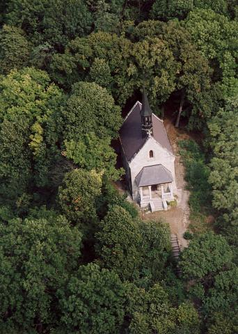 Gróf Sándor Móricz és családja mauzoleuma a volt Metternich-uradalom területén. R.k. kápolna, 1879. Gyermely, Hungary, aerialphotography This is a photo of a monument in Hungary. Identifier: 11836